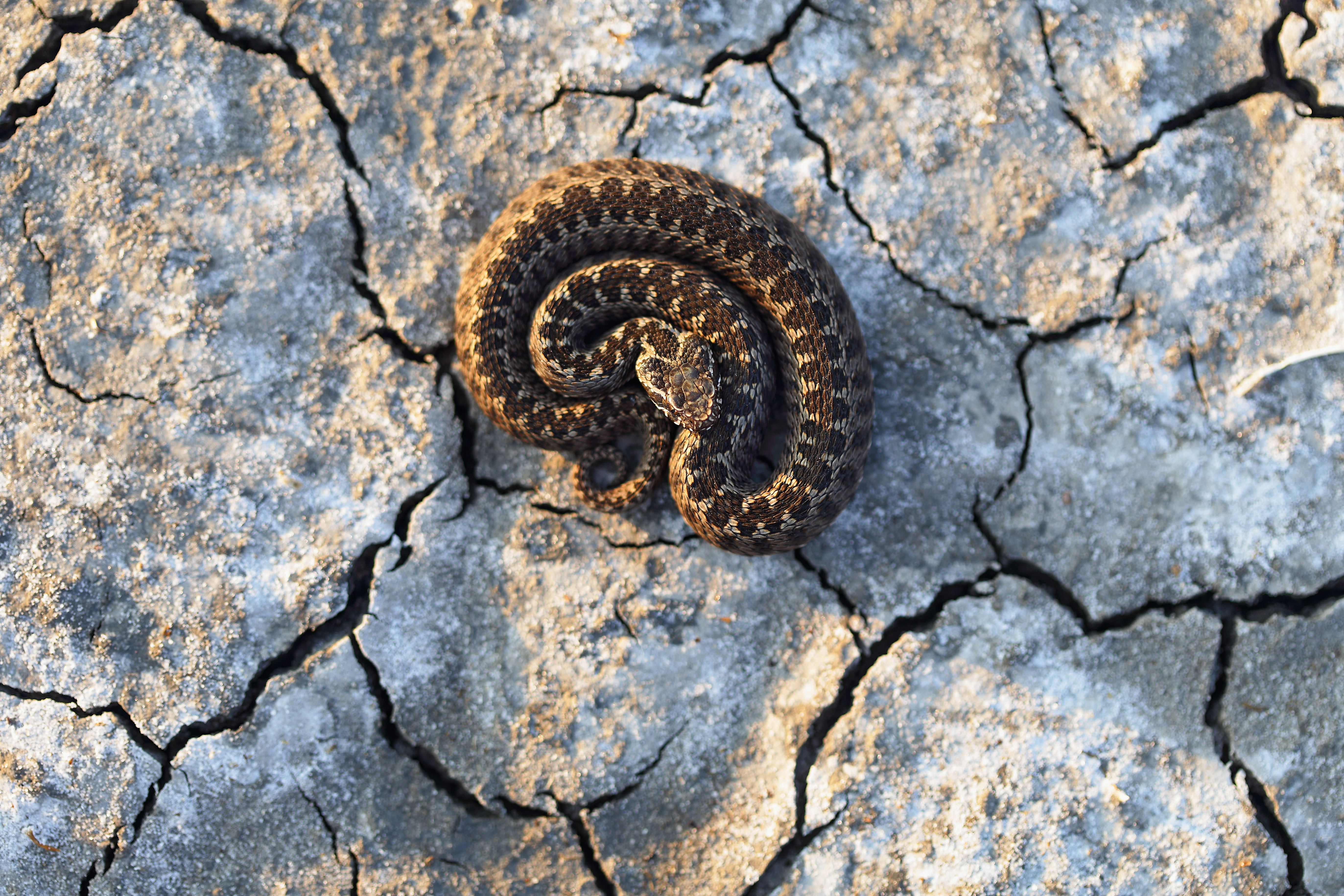 Місце зйомки: ландшафтний заказник Солоний Лиман. Об'єкт зйомки: Гадюка степова - Vipera renardi (Christoph, 1861)